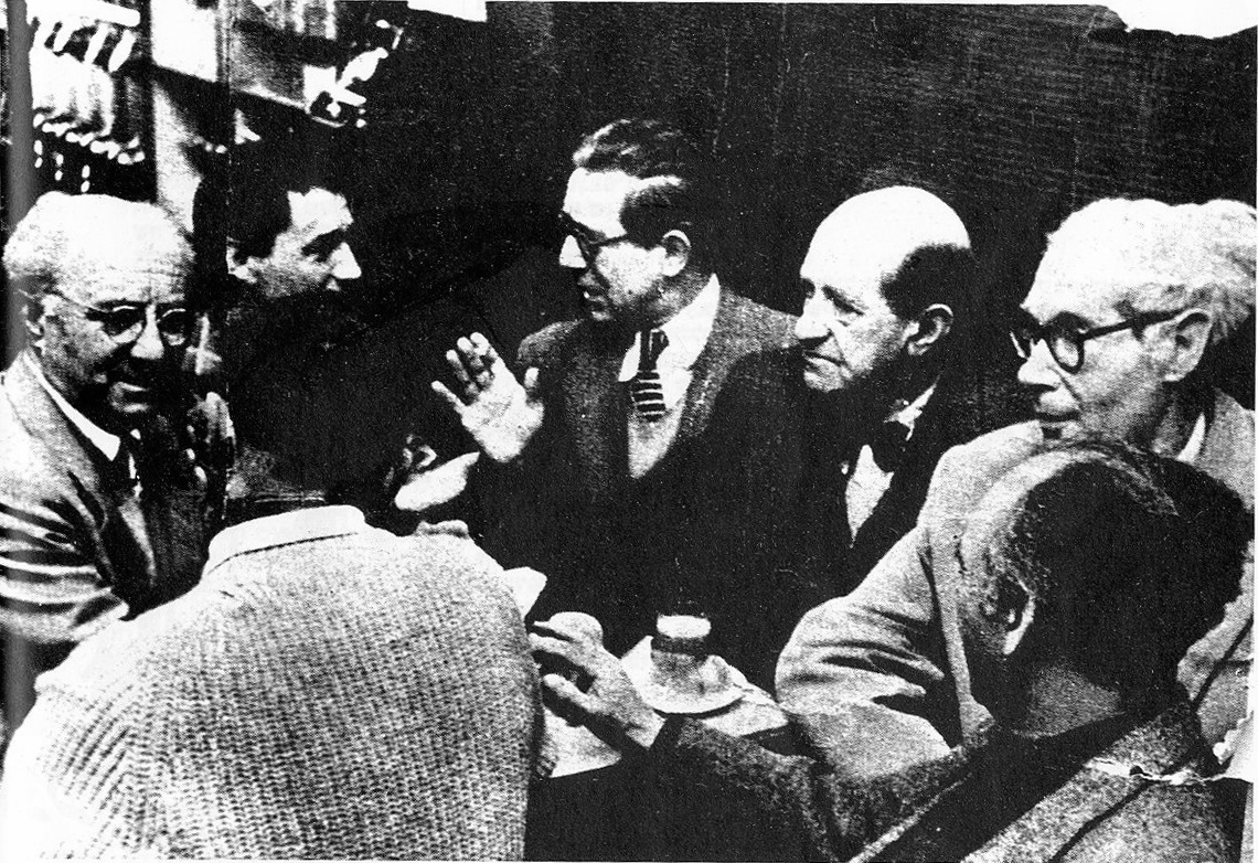 מימין לשמאל: מירון סימה, יהודה וולפרט, איזידור אשהיים, יעקב פינס, יוסי שטרן ומרדכי ארדון בקפה טעמון, שנות ה-40 של המאה ה-20.